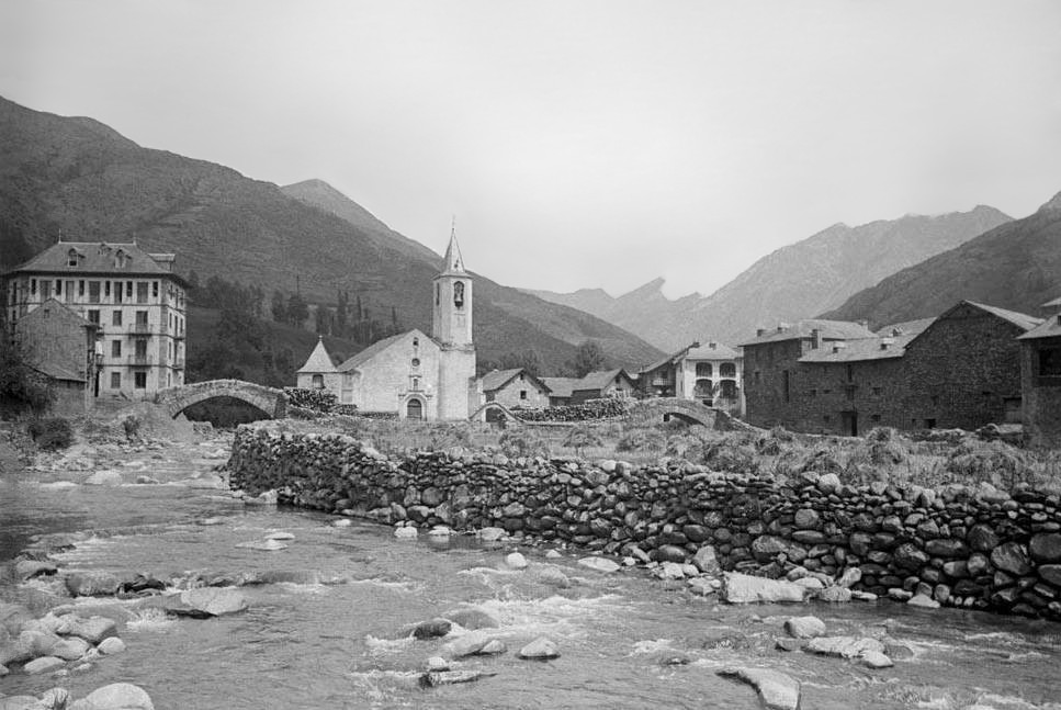 Imatge